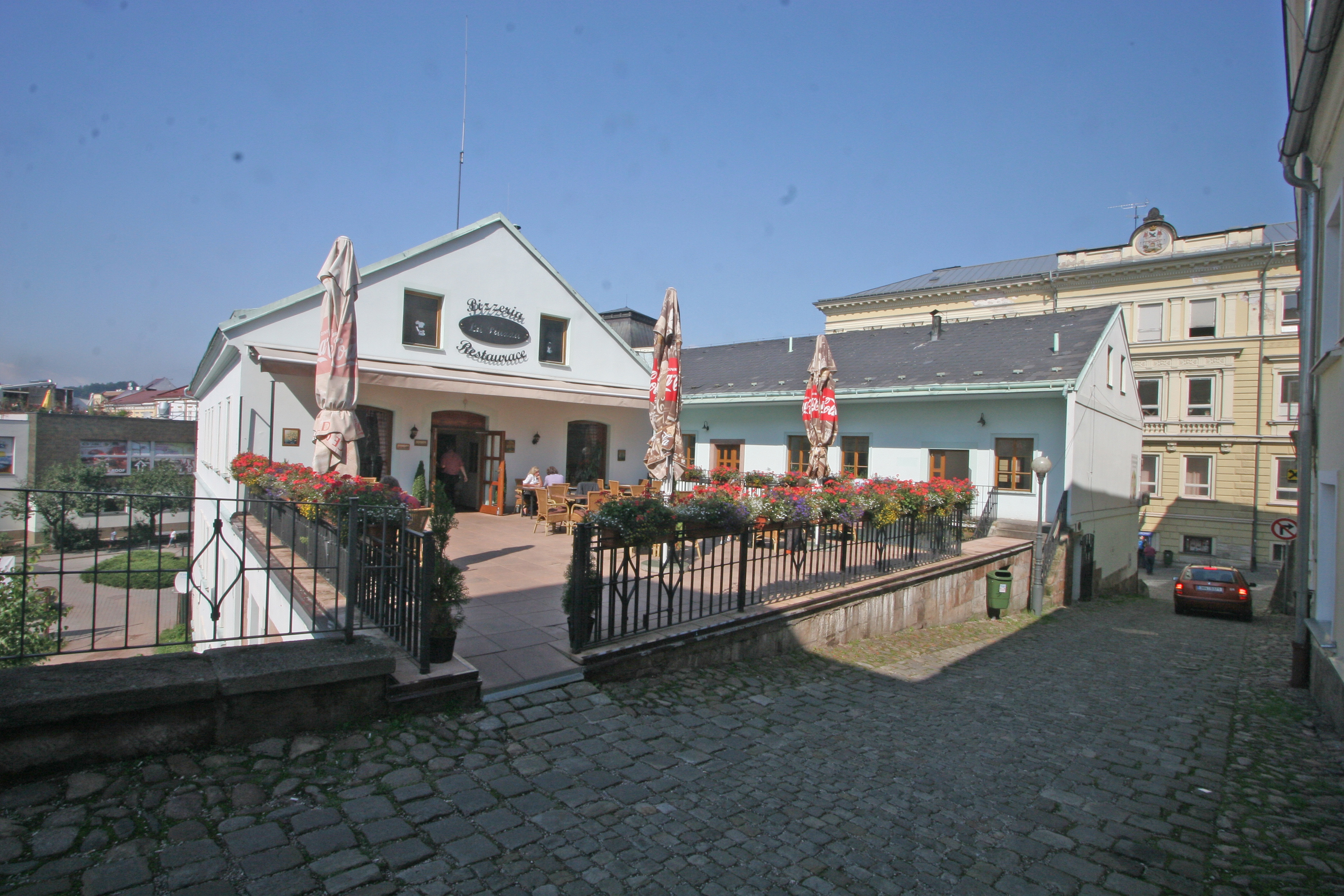 Trutnov ulice Na Vrchu